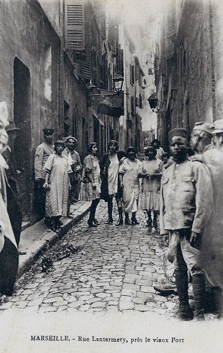 Marseille rue Lantermery près du Vieux-Port